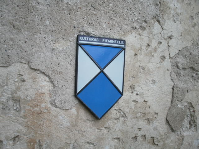 Läti ja Euroopa ehitusmälestise tähis.